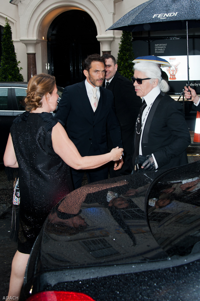 Fendi store opening - Karl Lagerfeld